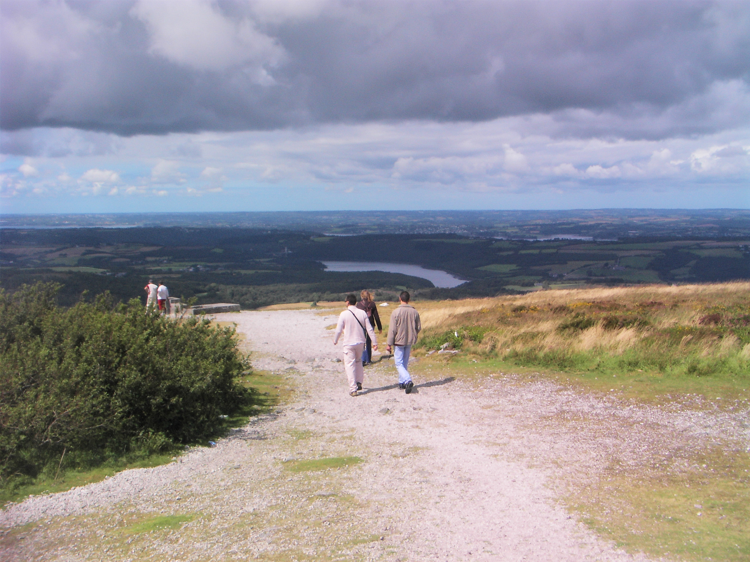 Point de vue depuis le Ménez-Hom le 17 août 2007, France.